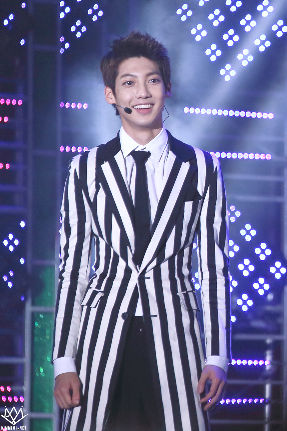 150516 보이프렌드 양산웅상회야제